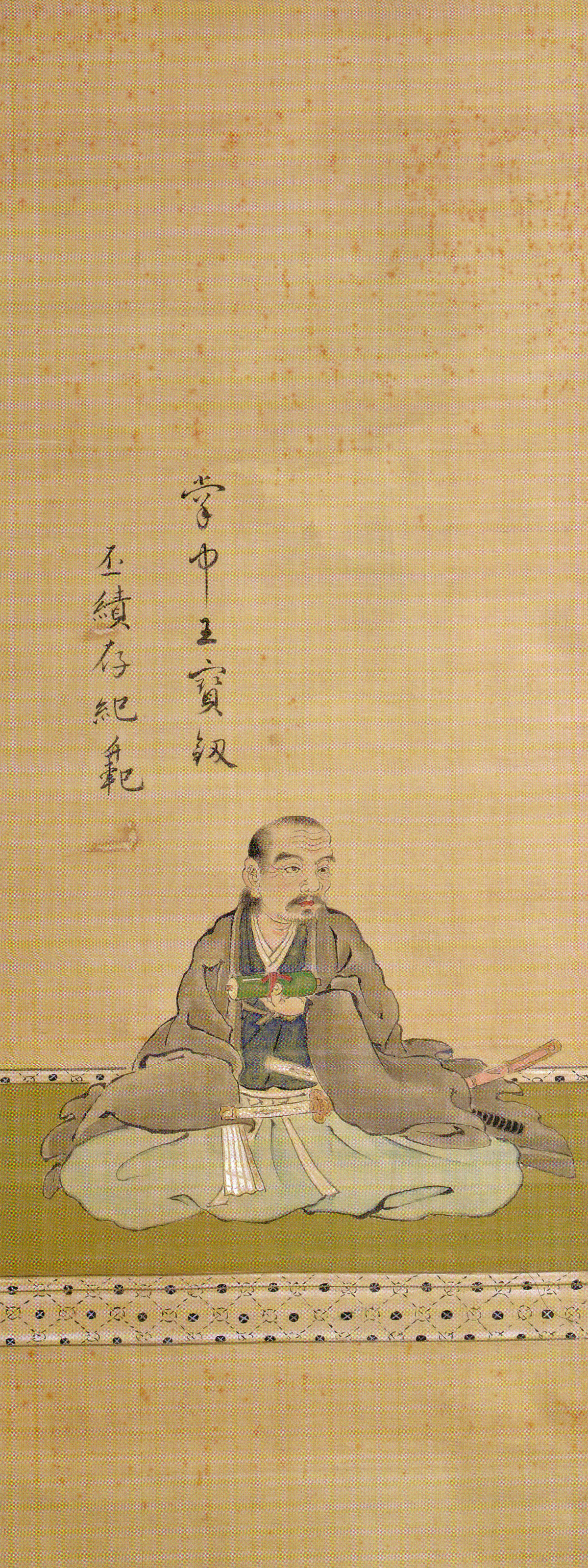 丸目長恵像 （江戸時代後期/19世紀作）